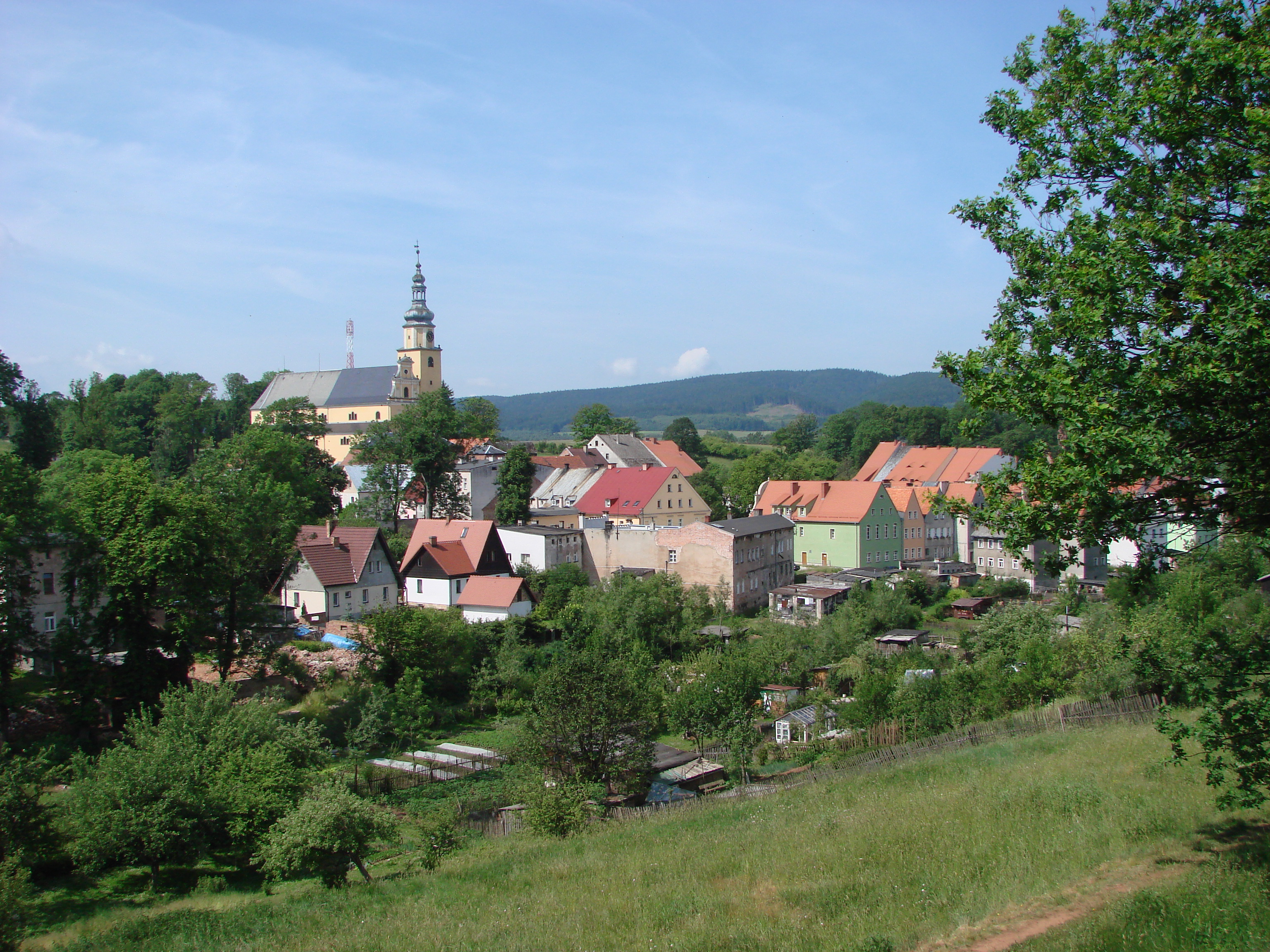 miasto Chełmsko Śląskie, Lubawka